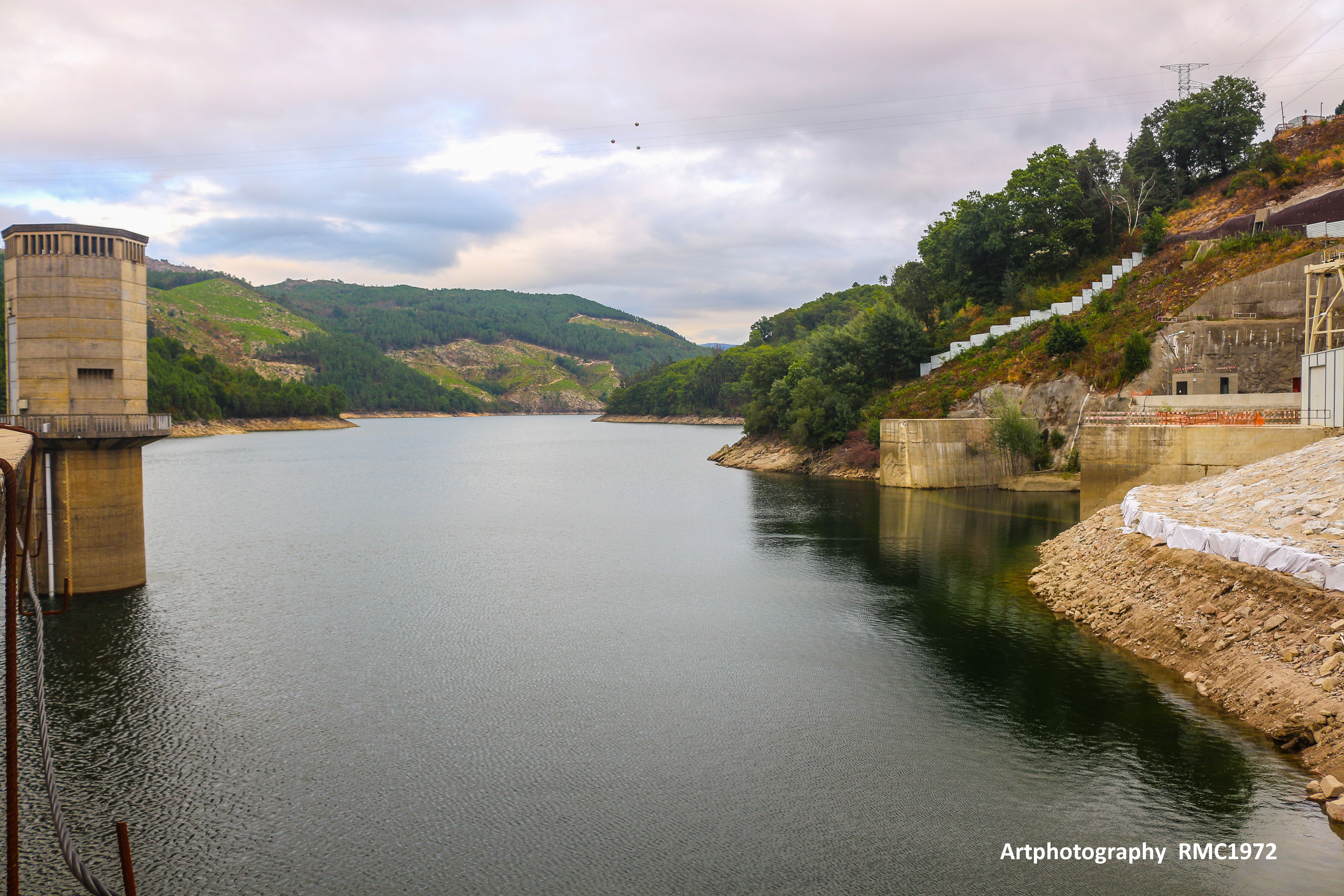 Baragem Salomonde - Portugal - Braga